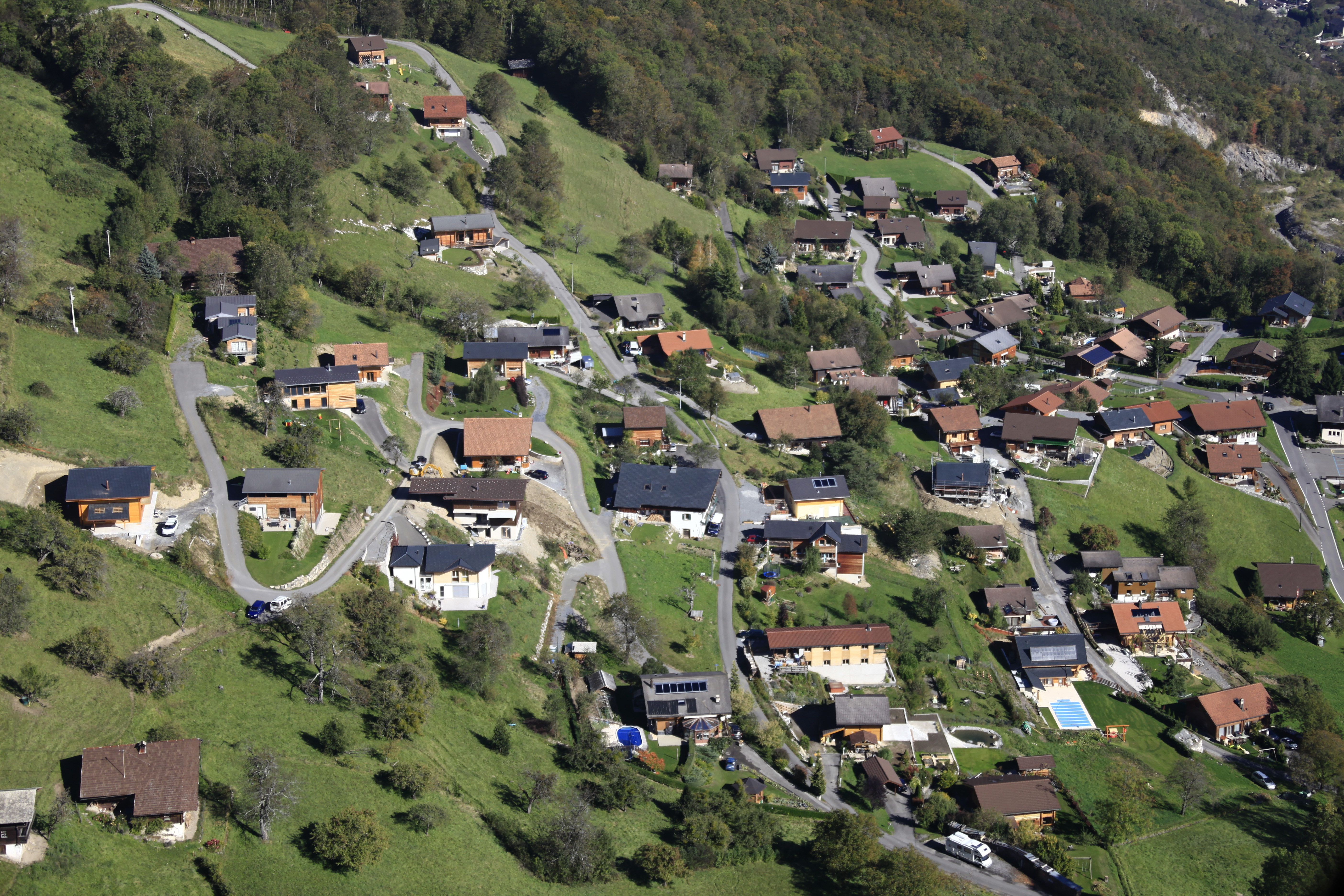 Vue aérienne du village des Neyres